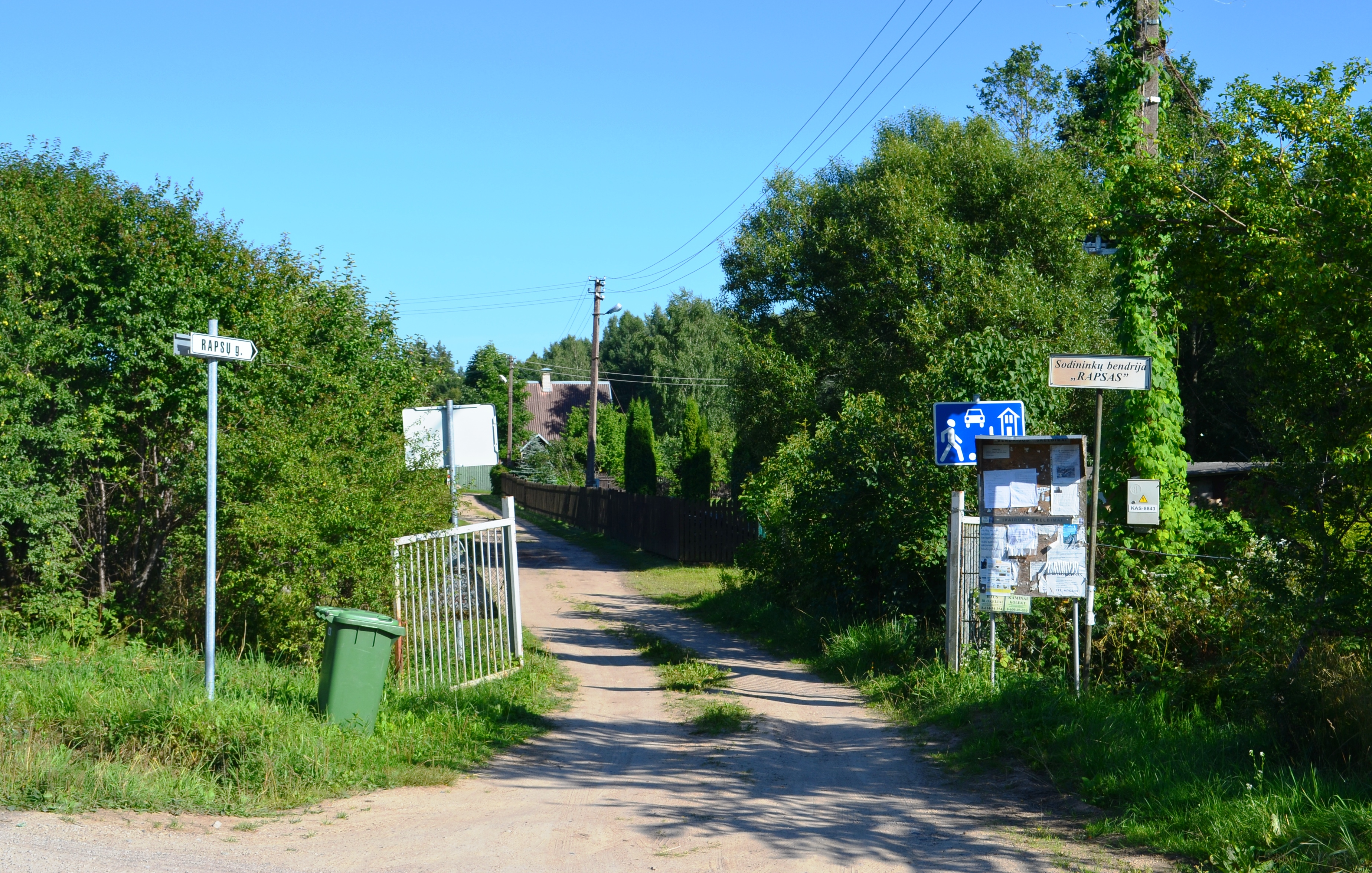 SB „Rapsas“, Vilkiškės, Vilniaus r.